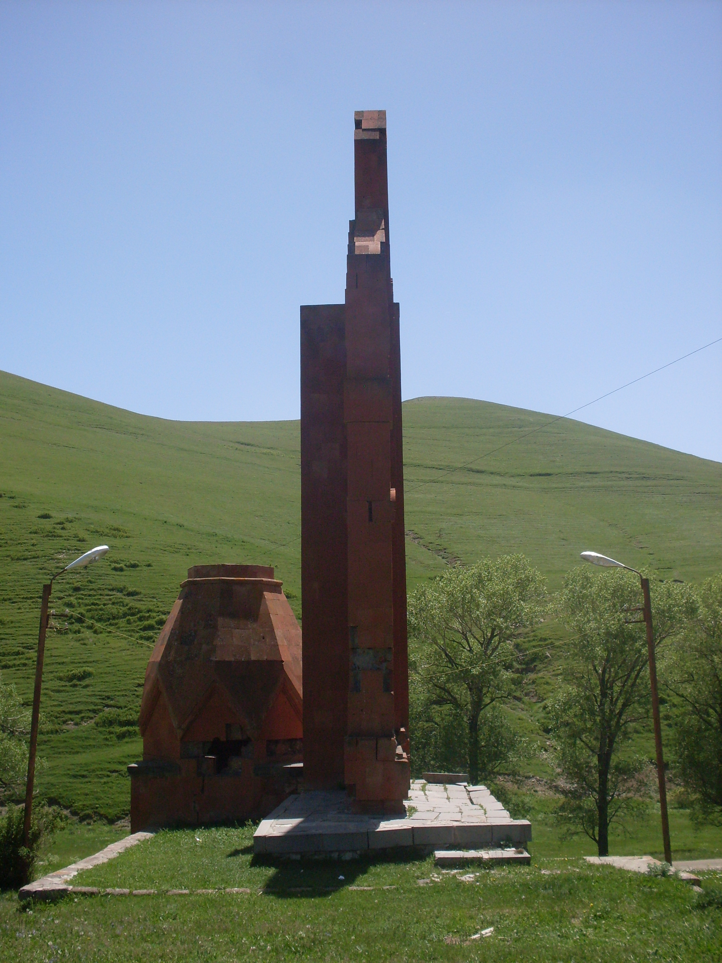 1941-1945 թթ. հայրենական պատերազմին նվիրված հուշարձան Արփենի գյուղում, Շիրակի մարզ 19/4